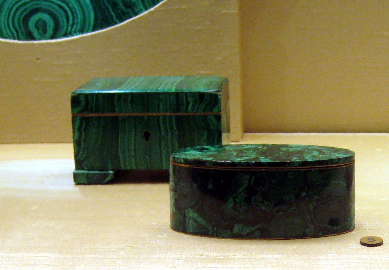 4. Малахитовая шкатулка. Екатеринбург, 19 век. 19 век. ГИМ 5. Туалетная коробочка. Екатеринбург. Посл. треть 19 в. ГИМ